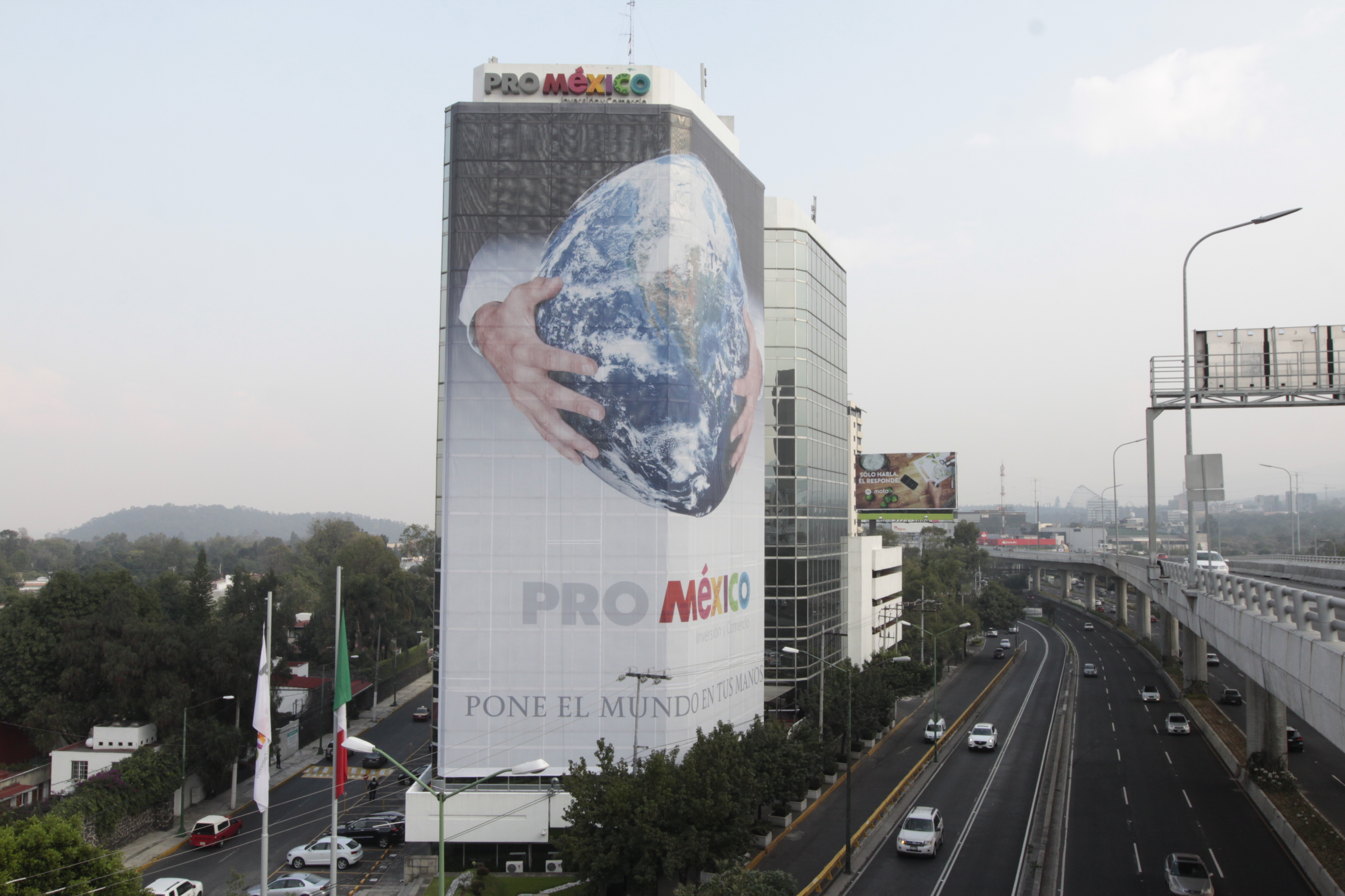 Edificio de las oficinas centrales de ProMéxico